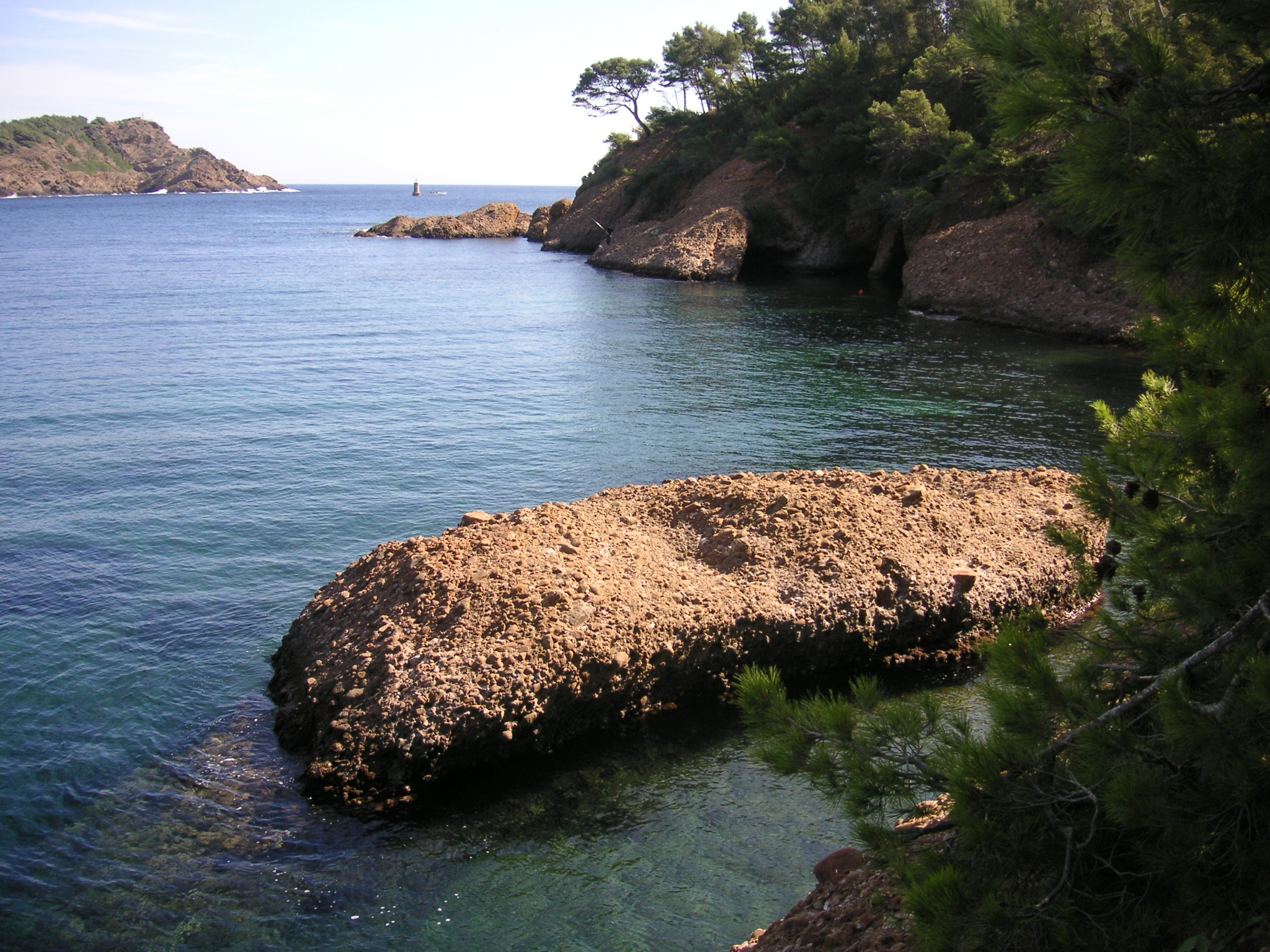 Plage d'une crique proche du pic de l'aigle à La Ciotat (13), France.